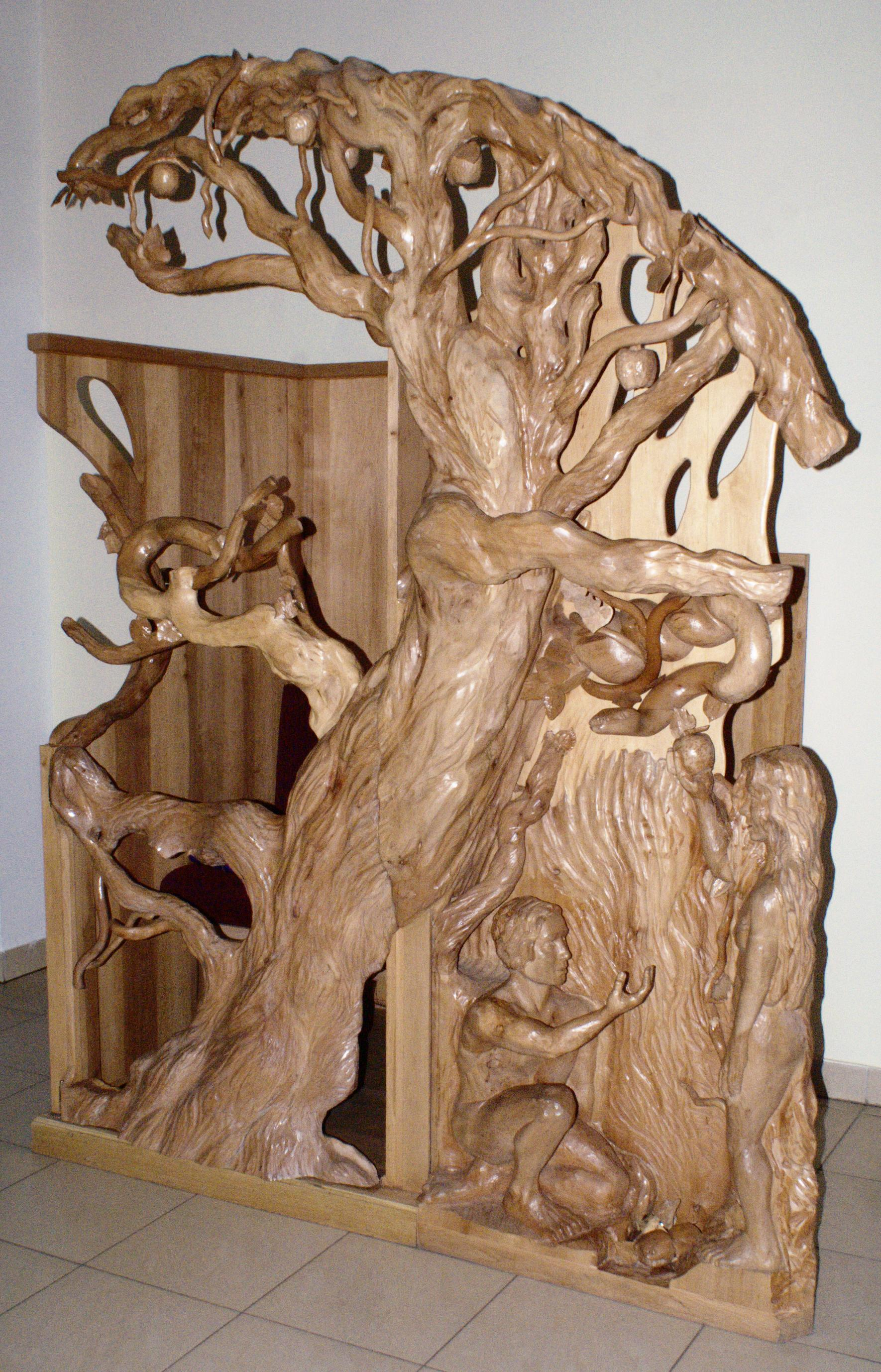 Kościół parafialny Świętej Trójcy - Gdynia Dąbrowa